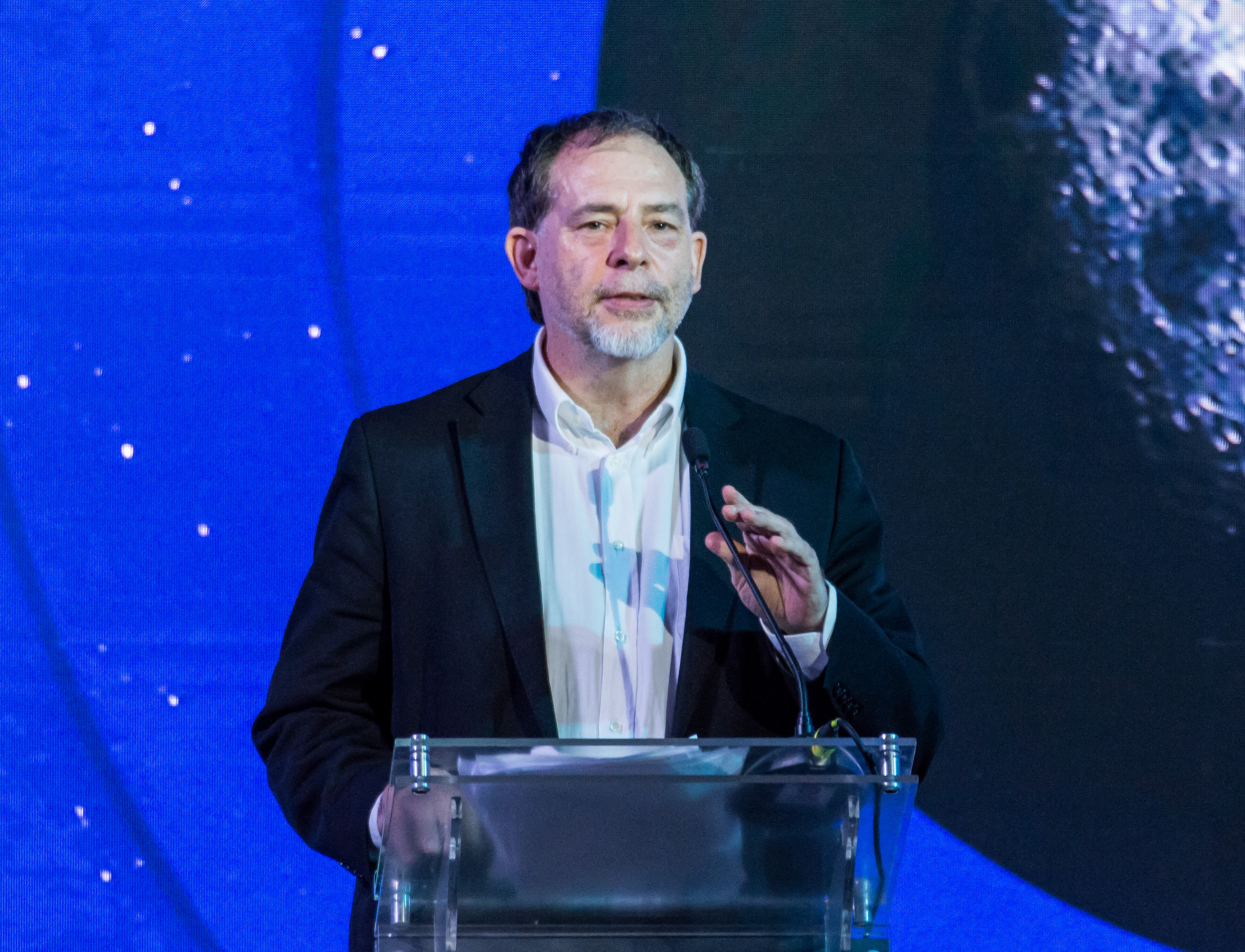 Inauguaración Congreso Futuro, Guido Girardi